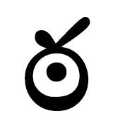 ттхакараму